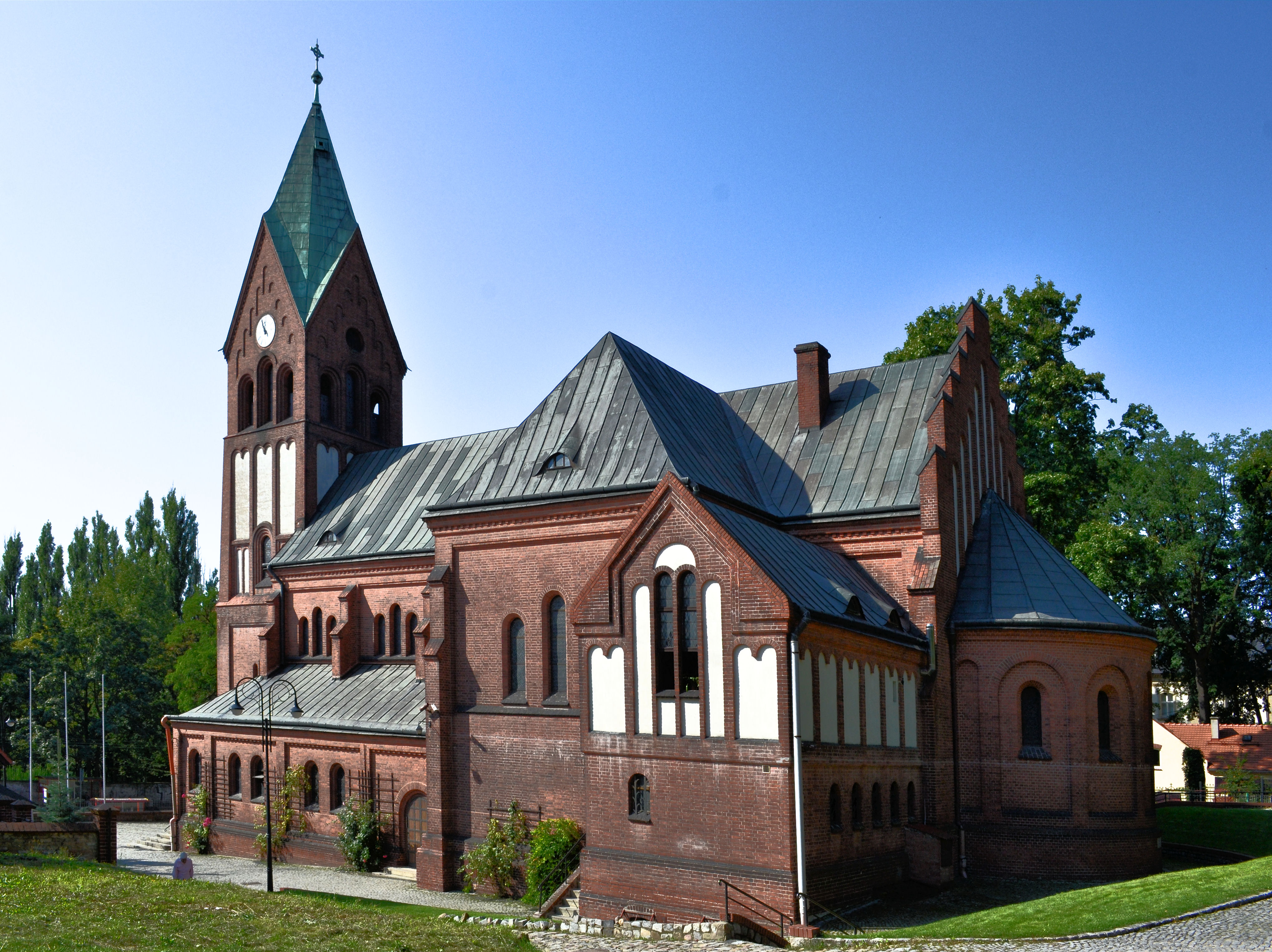 Kościół Podwyższenia Krzyża Świętego w Gorzowie Wielkopolskim.